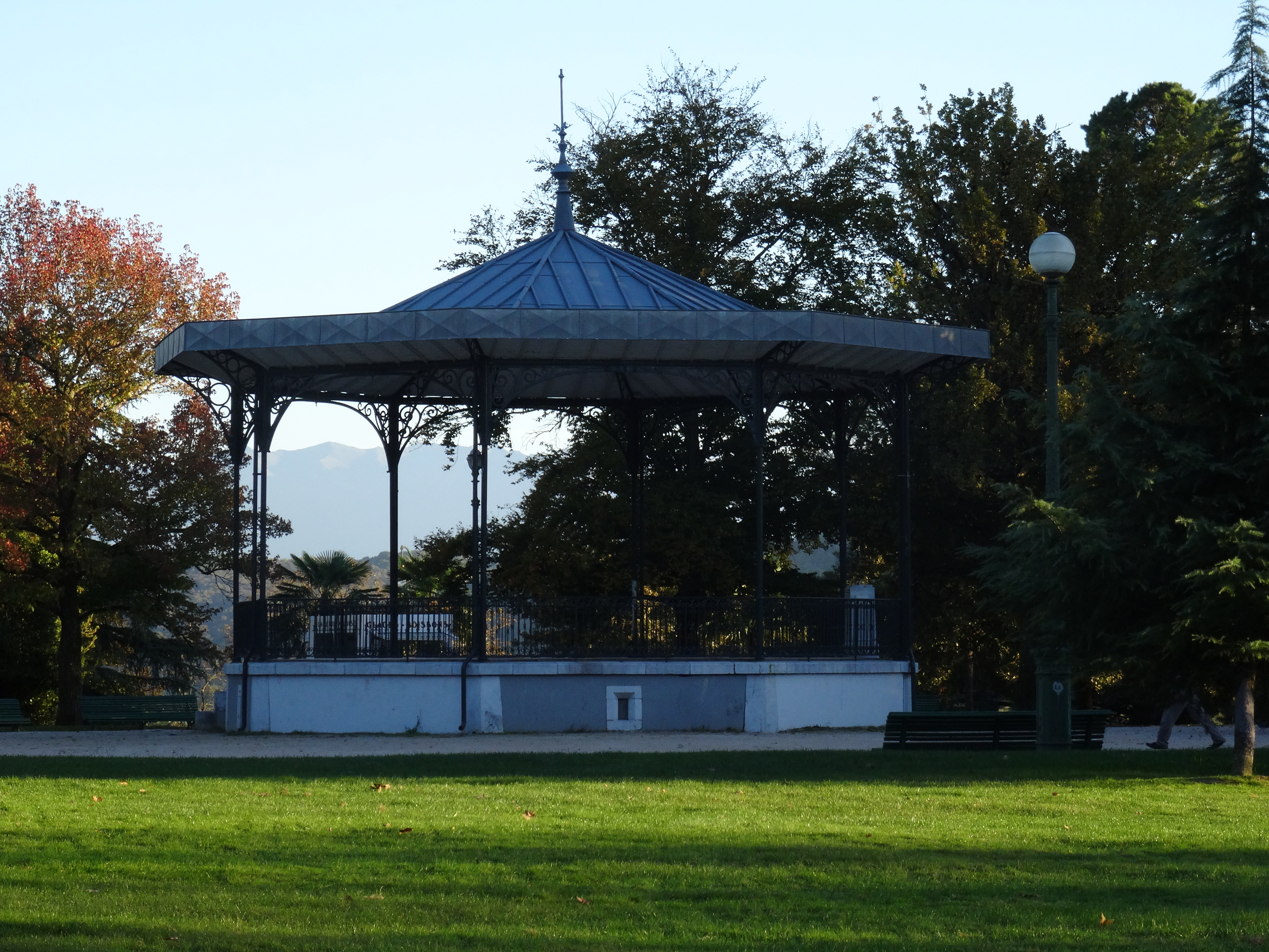 Parc Beaumont de Pau